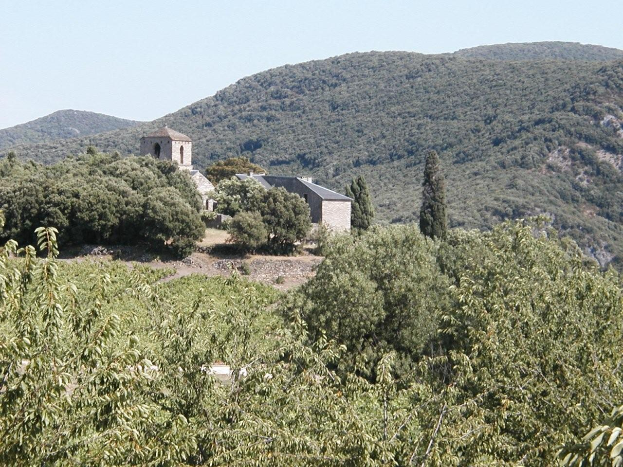 Saint-Julien (Hérault) - Vue générale du prieuré.